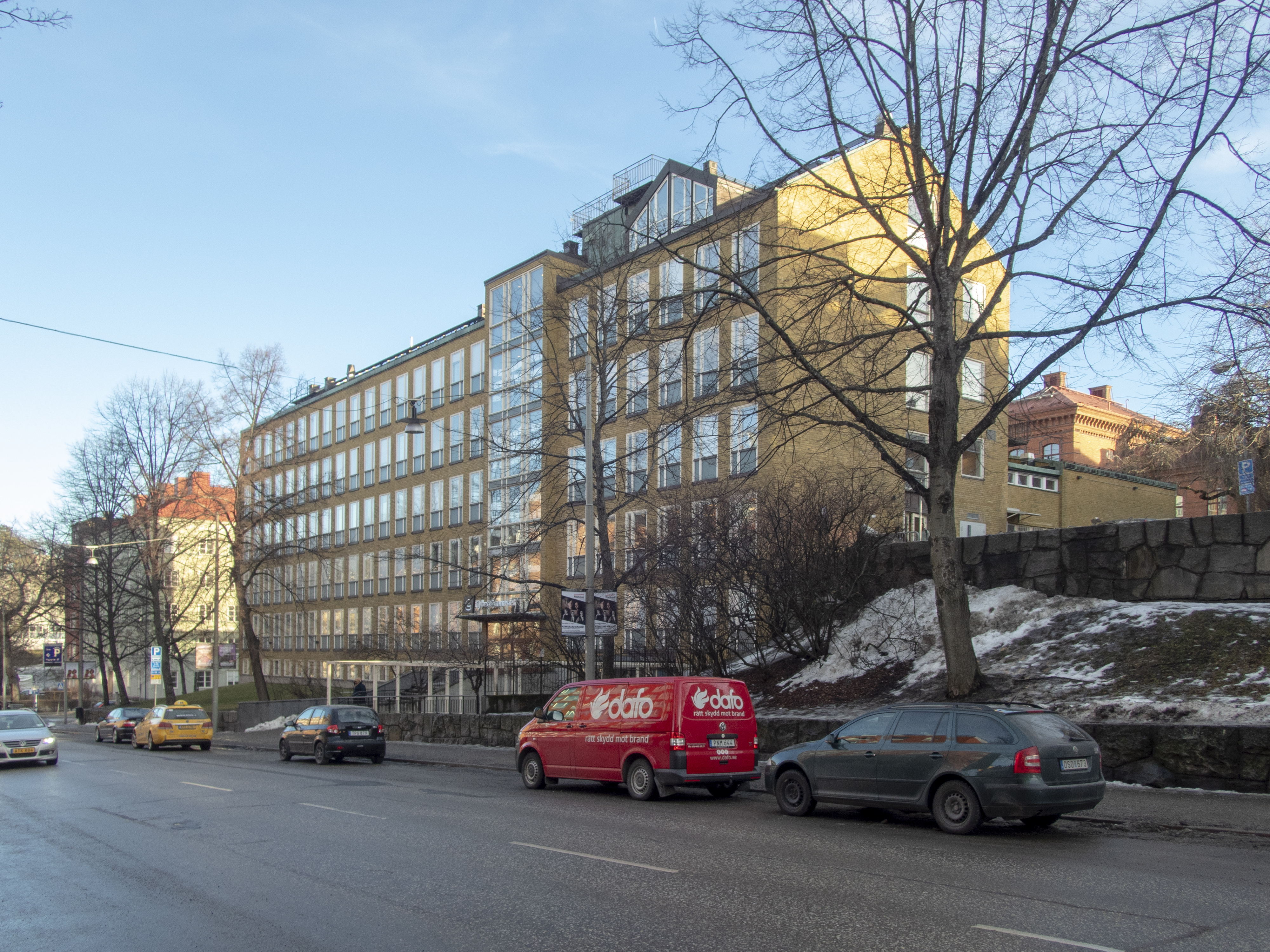 Mimer 5 ursprungligen institutionsbyggnad för Stockholms universitet, Hagagatan 25, Vanadisvägen 9, Nybyggnadsår 1958 - 1961, Holger Rundlöf (Byggmästare) Paul Hedqvist (Arkitekt) Stockholms Högskola (Byggherre)